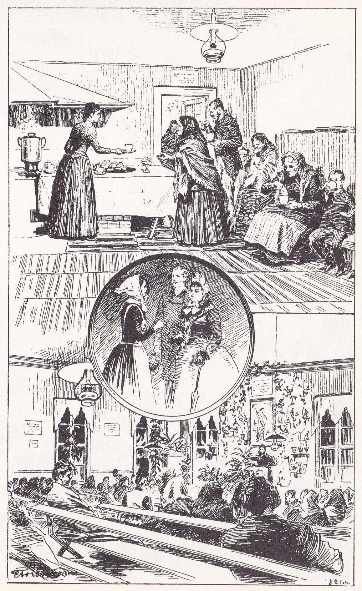 Fattigbjudning i en missionshydda (1882). Barn och vuxna bjuds på såväl andlig som lekamlig spis i missionshyddan på Stora Mejtens gränd 8. Bilden har återgivits flera gånger, t.ex: Claes Lundin: Nya Stockholm (1890) sid. 601, Per Anders Fogelström: Stad i bild (1970), Korrespondenskort från bleck-och kopparslagarmästaren Sven Hammar på Stora Meijtens gränd 8, Hyddor och Helgedomar i huvudstaden (1992)